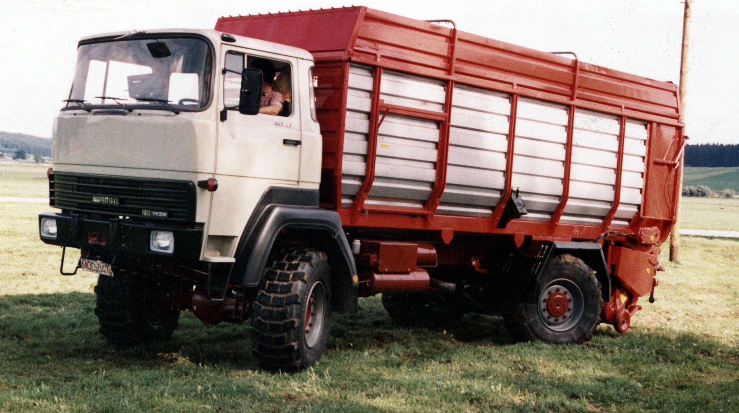 Einziger Rhein-Bayern-Prototyp mit Allradlenkung 1983. Aufbau und Ladewerk sind von Mengele.